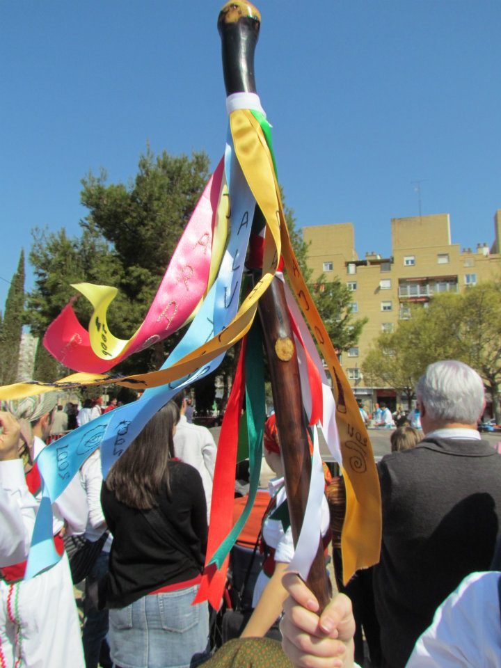 Palo que porta la Mayorala del Danze de San José. Encuentro de Danzes del Barrio de San José. 19 de Marzo. Las cintas son de colores vivos y bordados personalizados representando a los componentes del Danze.